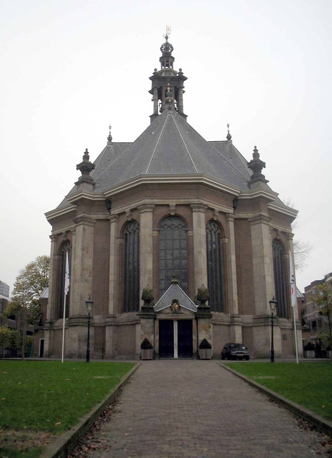 Den Haag Nieuwe Kerk